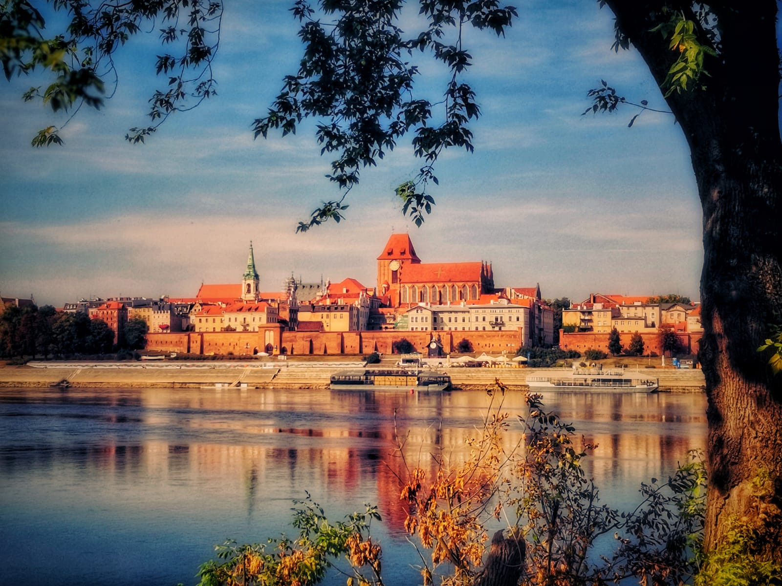 Zespół staromiejski Torunia, 2018